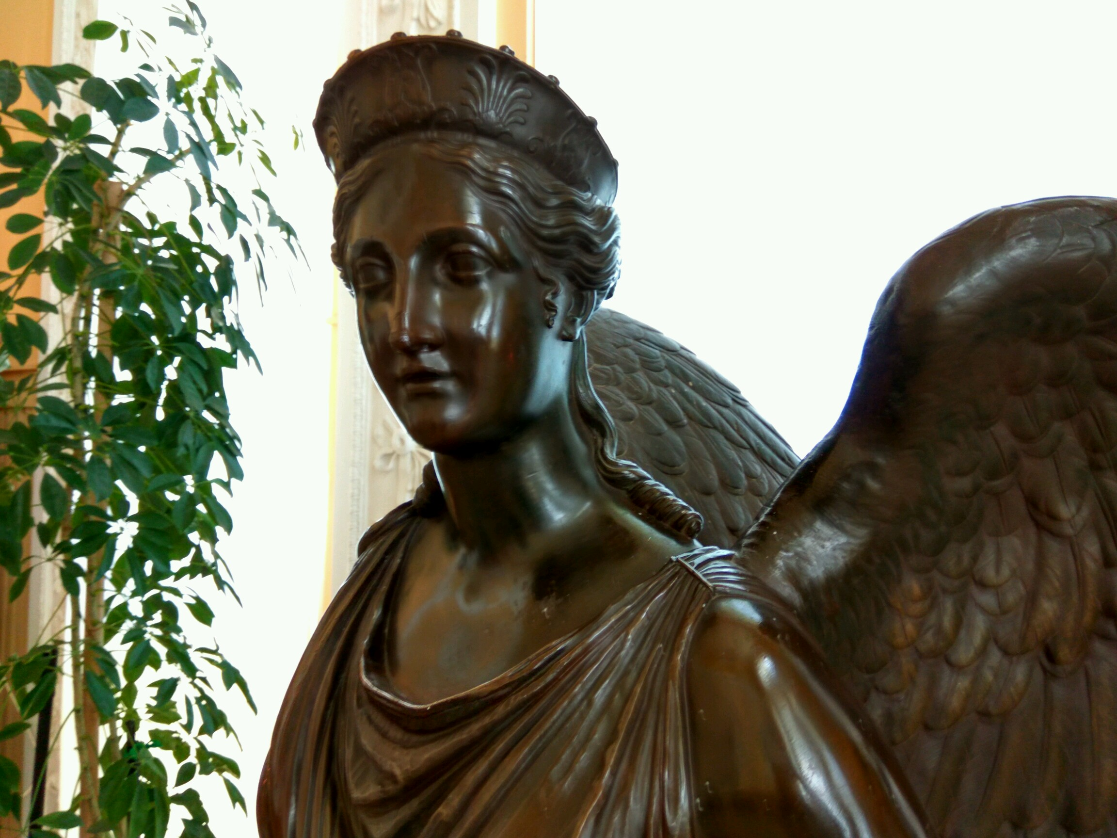 Гомель. Музей у палацы